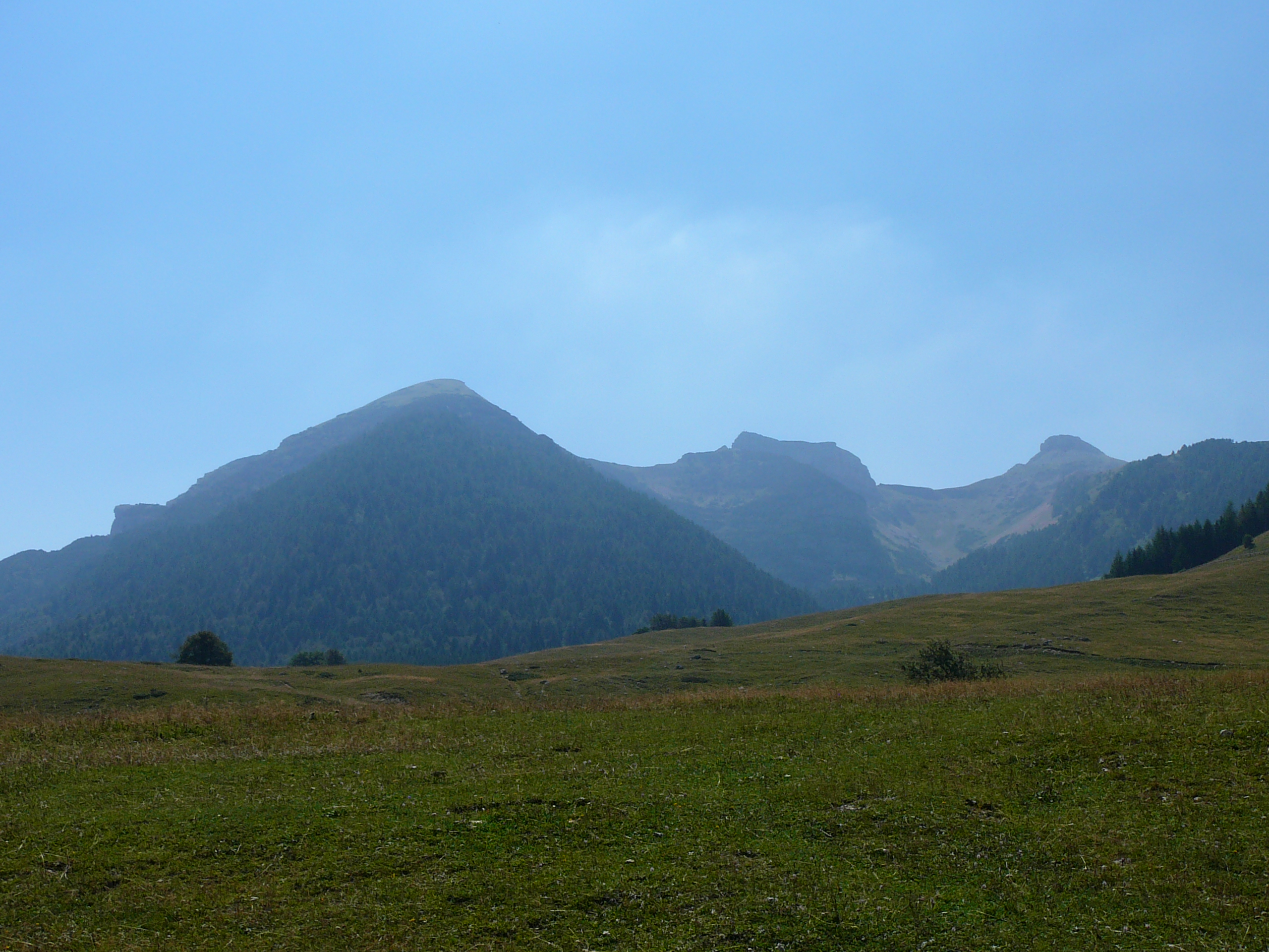 Tre Cime del Bondone